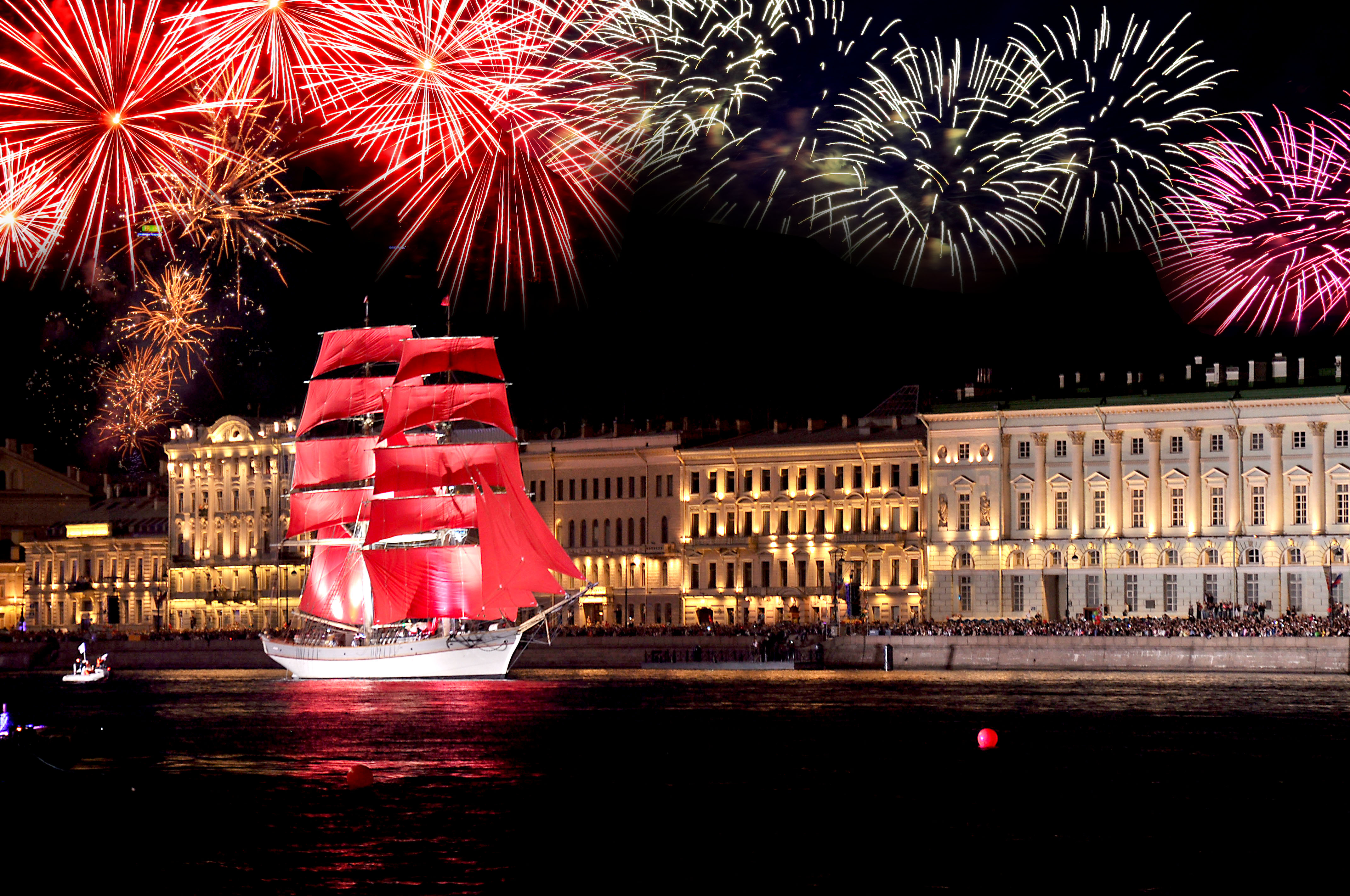 праздник "Алые паруса" в Санкт-Петербурге в 2010 году